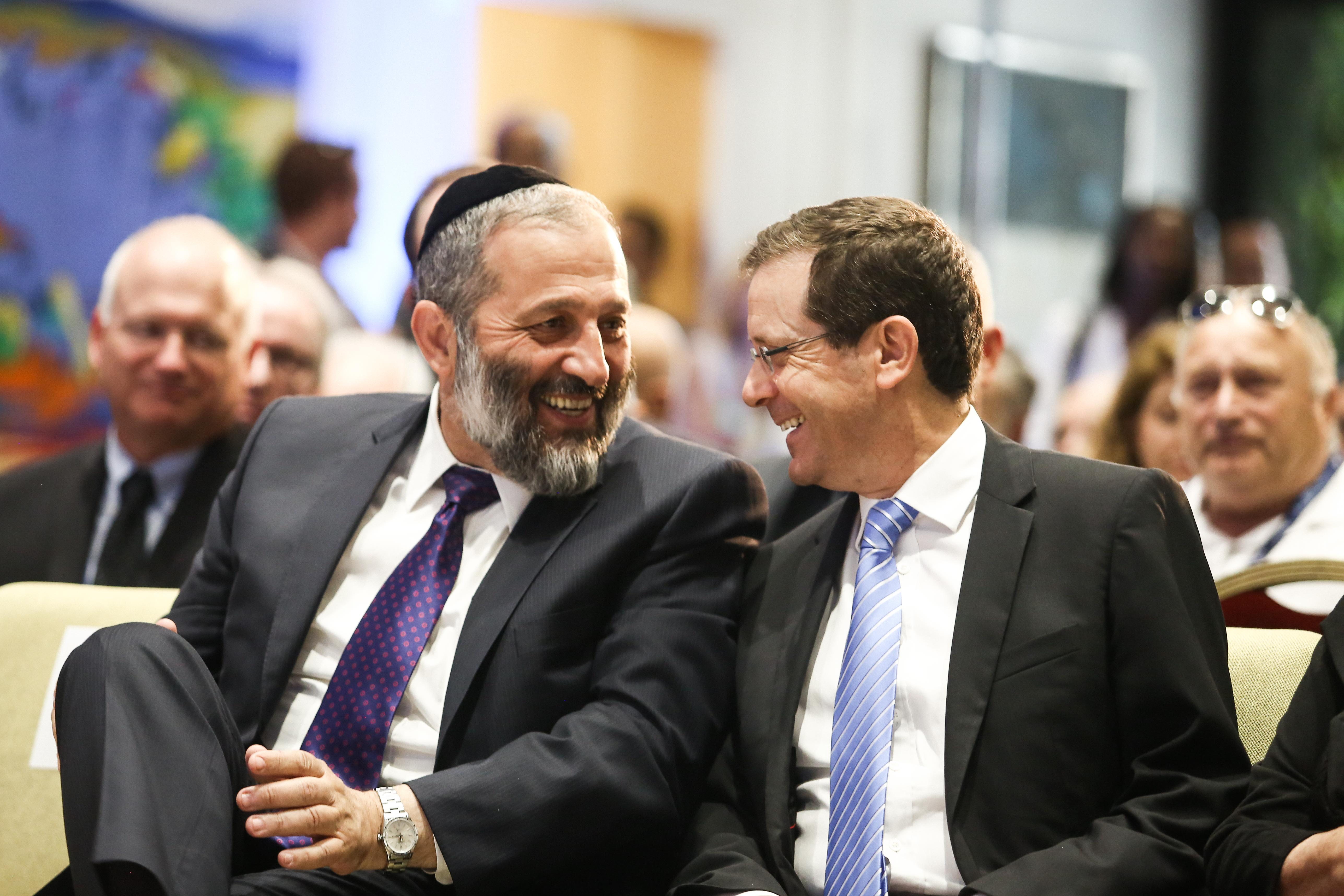 יצחק (בוז'י) הרצוג ואריה מכלוף דרעי בכנס הרצליה 2016 בבית הנשיא